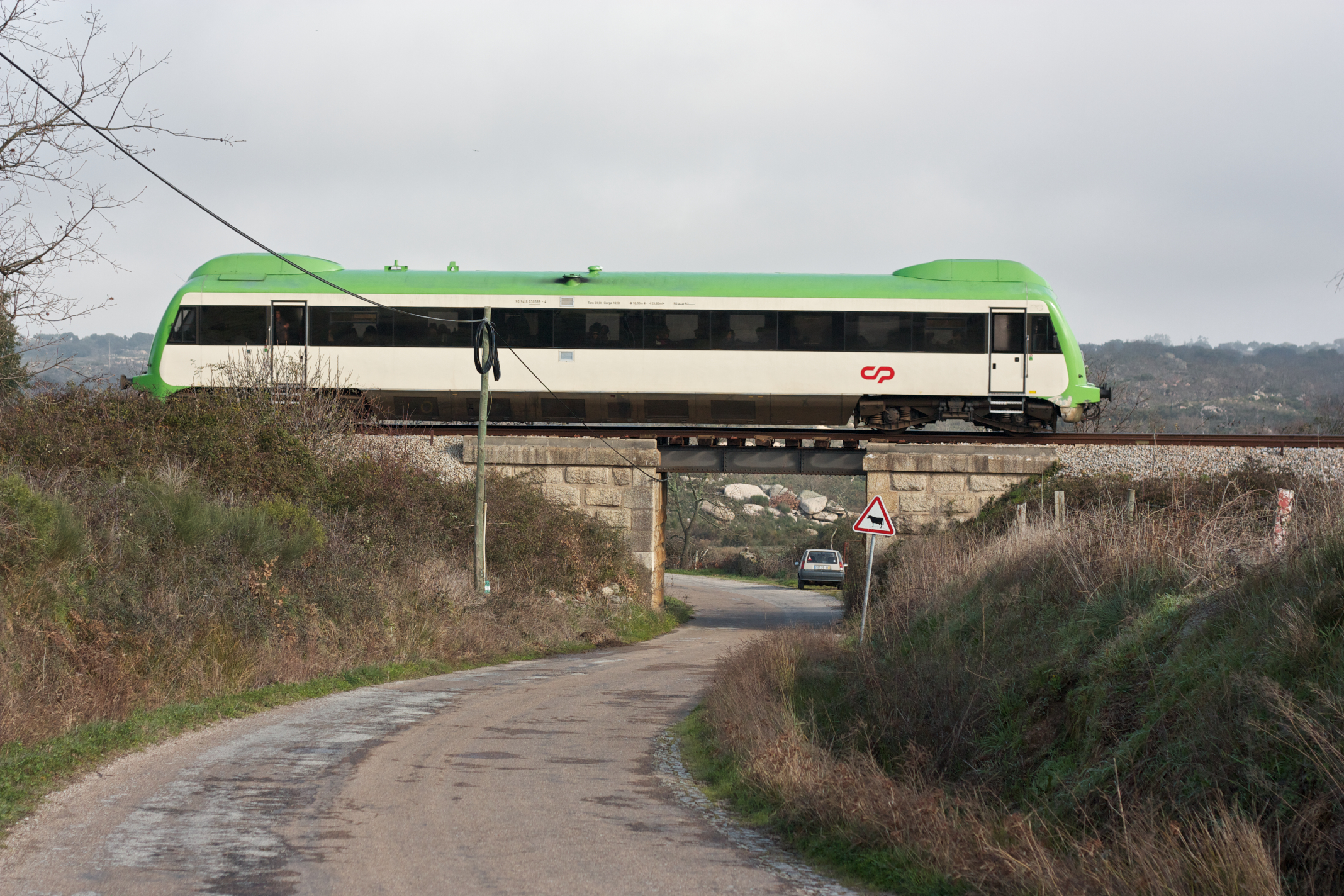 homenagem a uma fotografia de Paulo Lourinho, publicada no Panoramio. Tipo: Comboio Regional 5551 [Torre das Vargens - Marvão • Beirã] Local: Alagoa [Ramal de Cáceres, PK 217] Data e hora: 29 de Janeiro de 2011 [10h51] Material: Automotora 0369 [Unidade Simples Diesel - Allan Renovada] esta fotografia foi publicada no Panoramio.